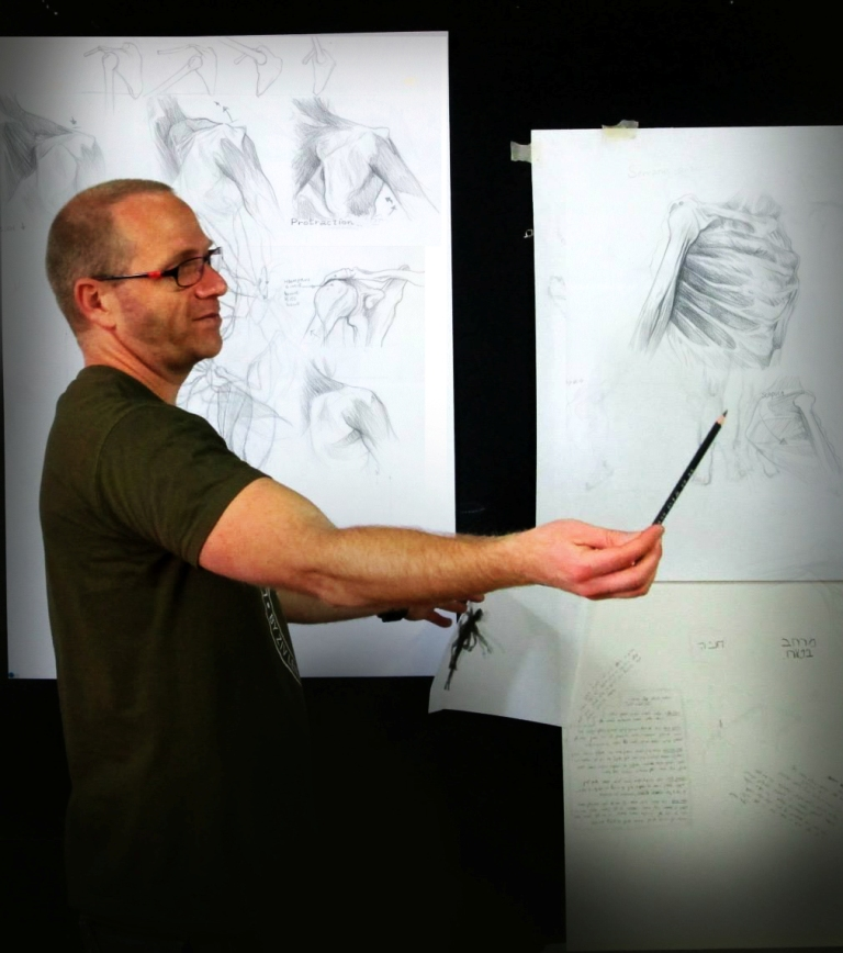 זיו לנצנר מלמד